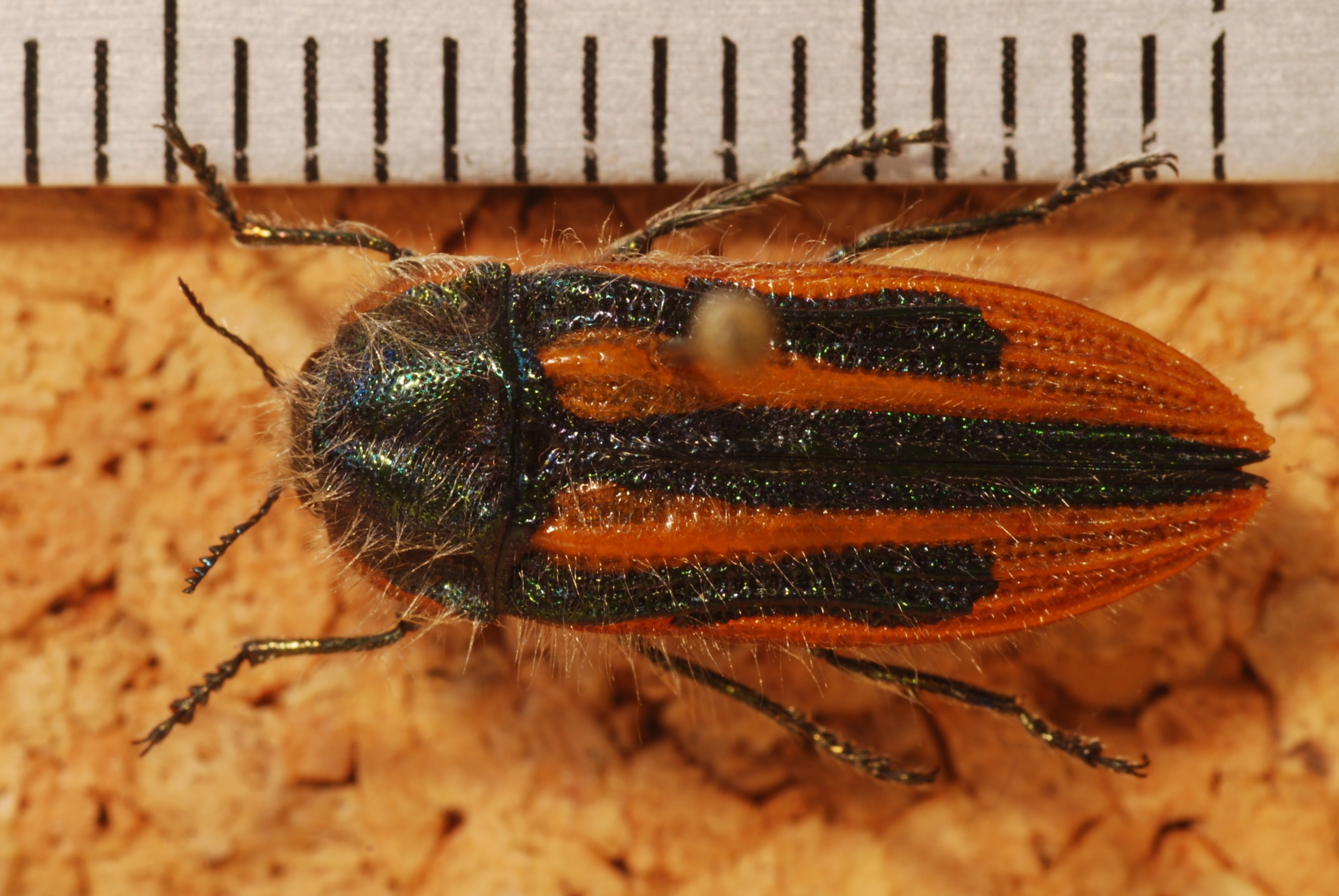 Las Trancas, Chillan, CHILE